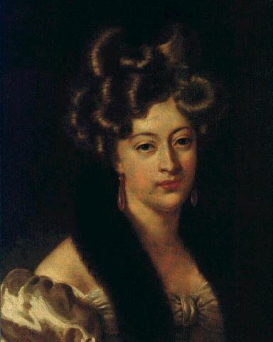 Елизавета Павловна Батюшкова (1806-1860), фрейлина, дочь Павла Львовича Батюшкова (1765-1848) и Софье Евстафьевны Пальменбах (1781-1838), правнучки Э.Бирона и внучки баронессы Е.И.Черкасовой.